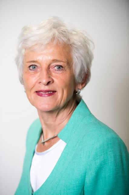 Jacqueline Cramer